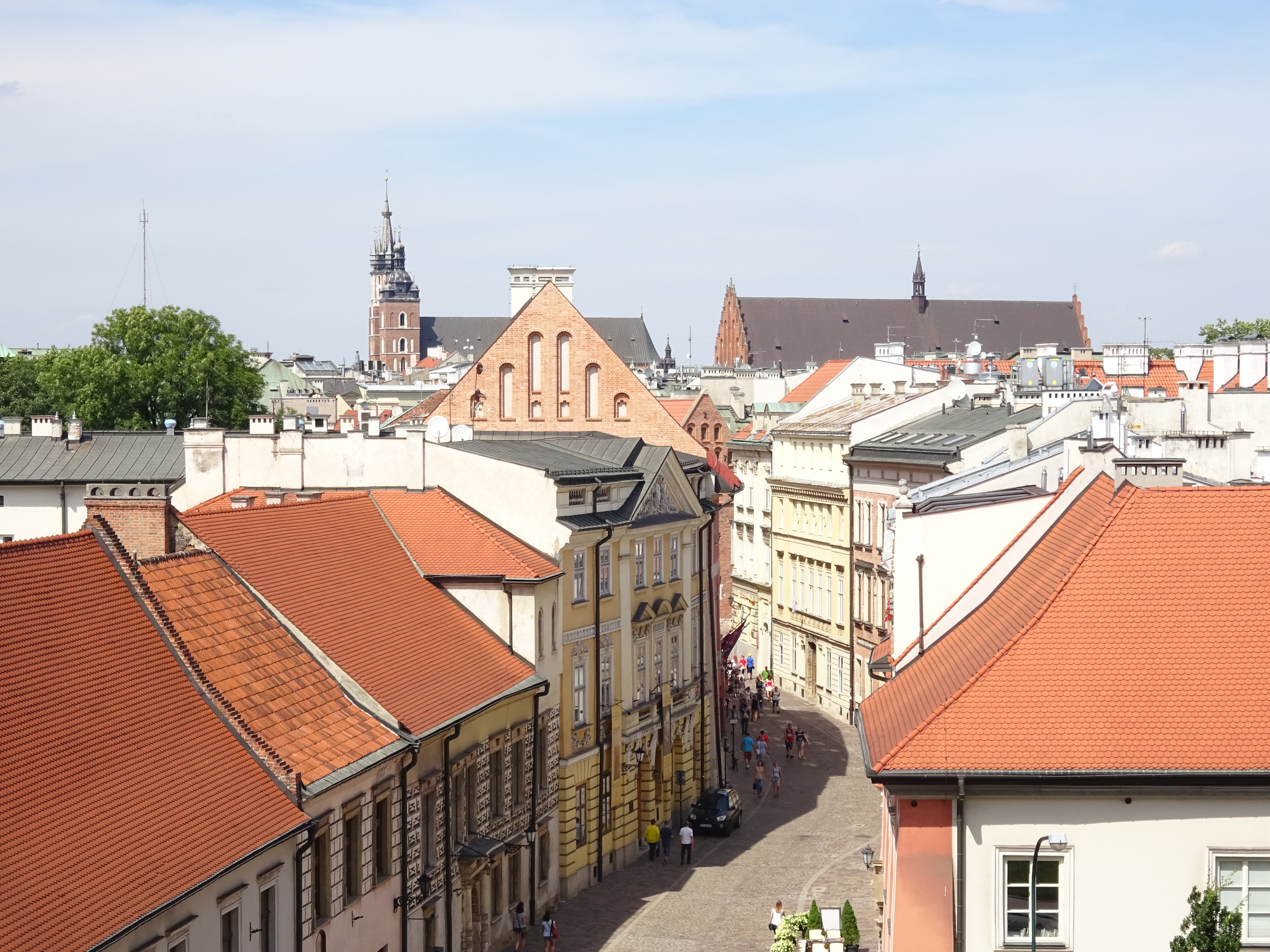 Ulica Kanonicza w Krakowie. Widok z Wawelu. W tle Stare Miasto - Kościół Mariacki i Kościół św. Trójcy. 2016